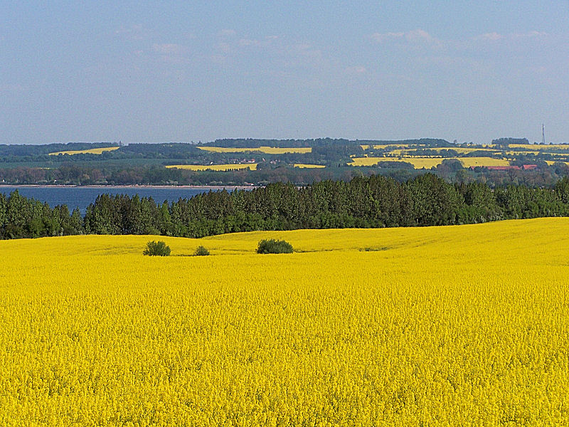 Landschaft mit Rapsfeldern an der Wohlenberger Wiek